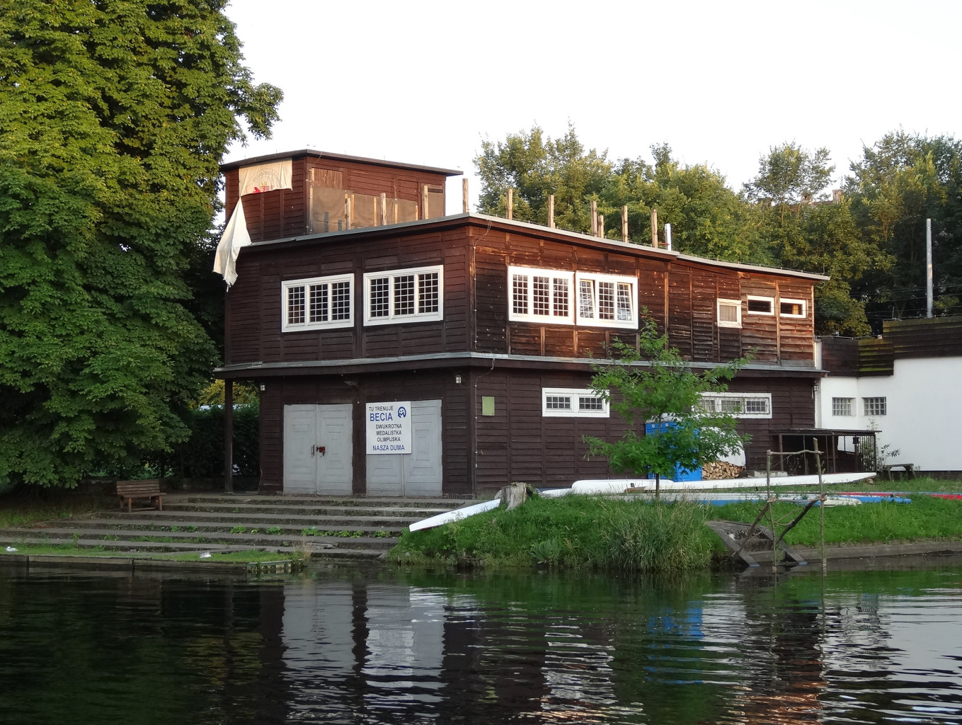 Przystań wioślarsko-kajakarska na Babiej Wsi w Bydgoszczy, użytkowana m.in. przez sekcję turystyki wodnej Kujawsko-Pomorskiej Szkoły Wyższej